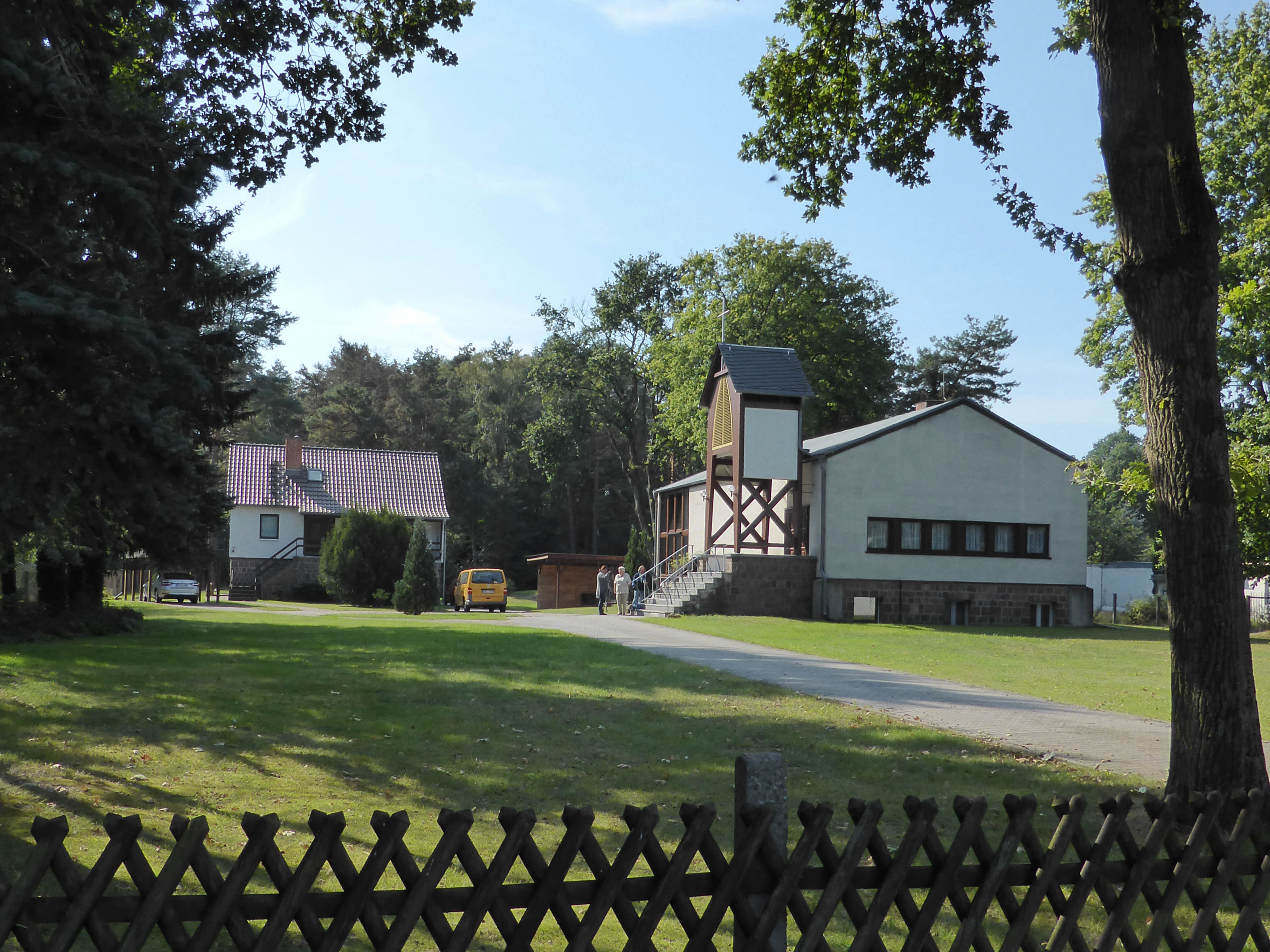 Pfarrhaus und katholische Kirche St. Josef in Steckelsdorf.